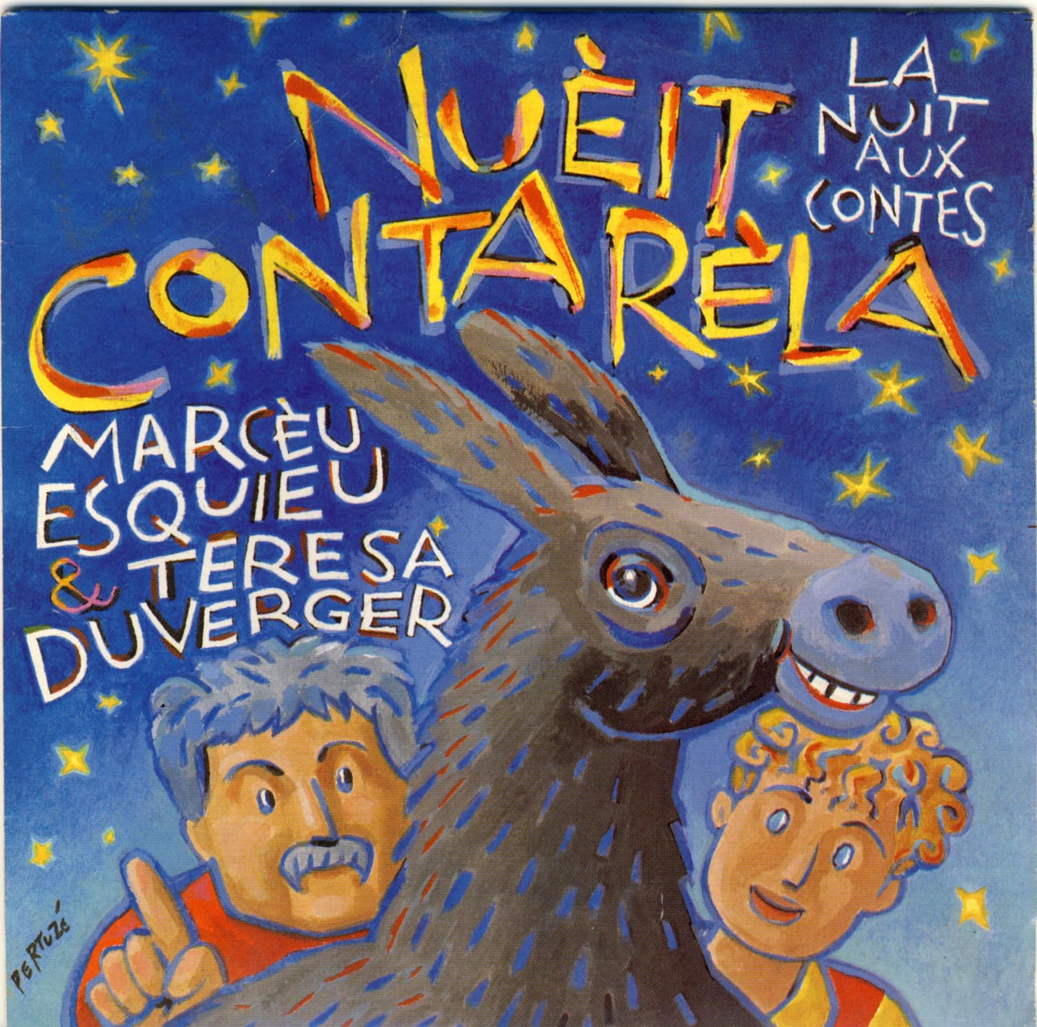 Nuèit contarèla (La nuit aux contes), de Marceau Esquieu et Thérèse Duverger